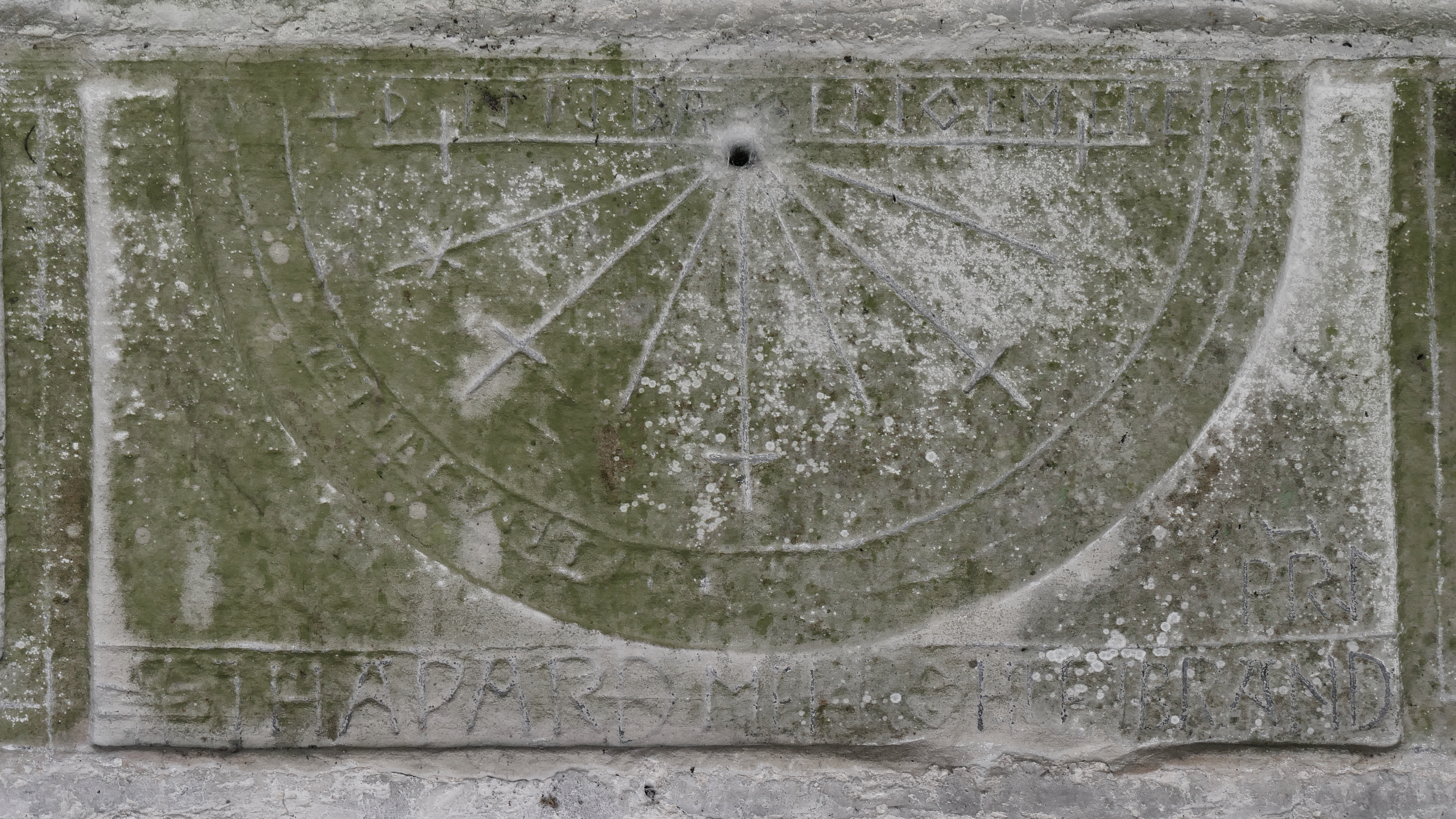 St Gregory's Minster, Kirkdale anglo-saxon inscription